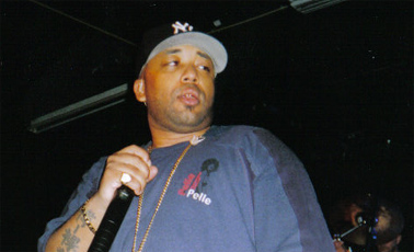 E-Life, a rapper from the Netherlands